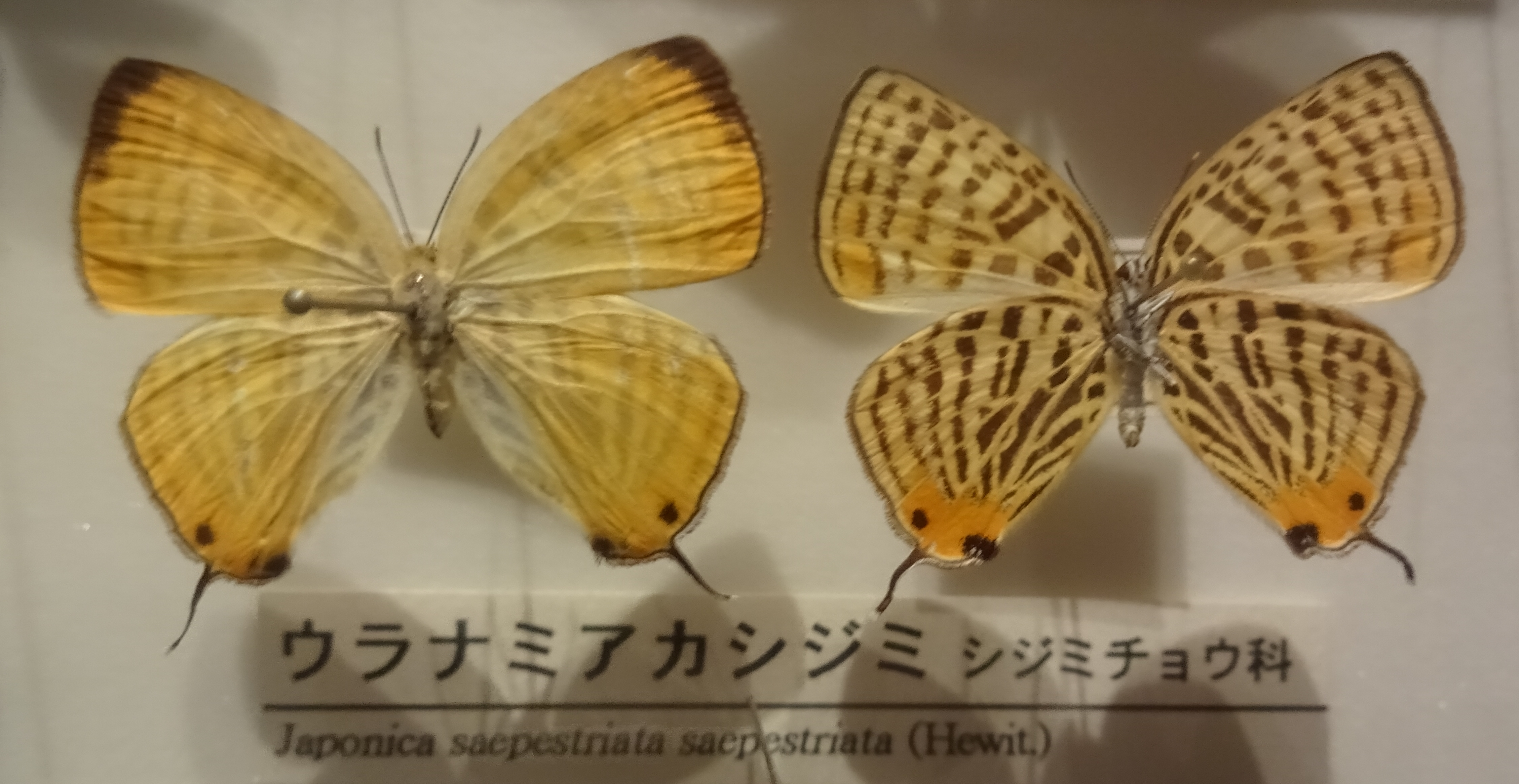 ウラナミアカシジミ